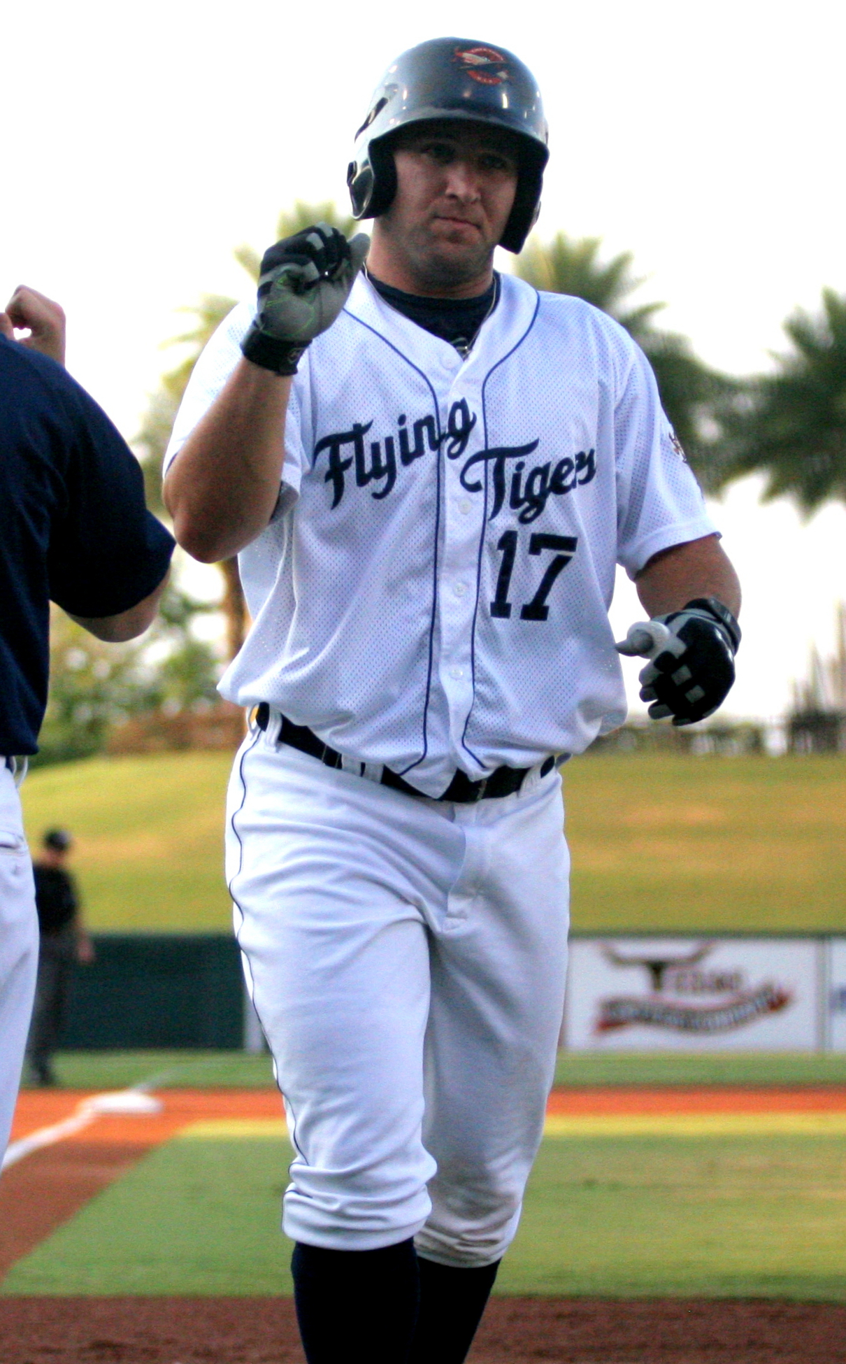 Tyler Collins